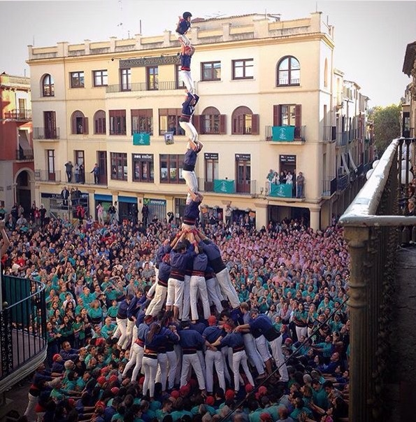 Primer pilar de 8 amb folre i manilles carregat per els Capgrossos de Mataró